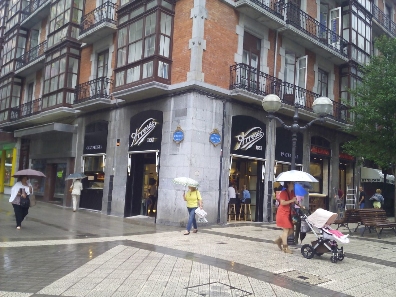 Esquina calles Ledesma y Berastegui, en Bilbao.